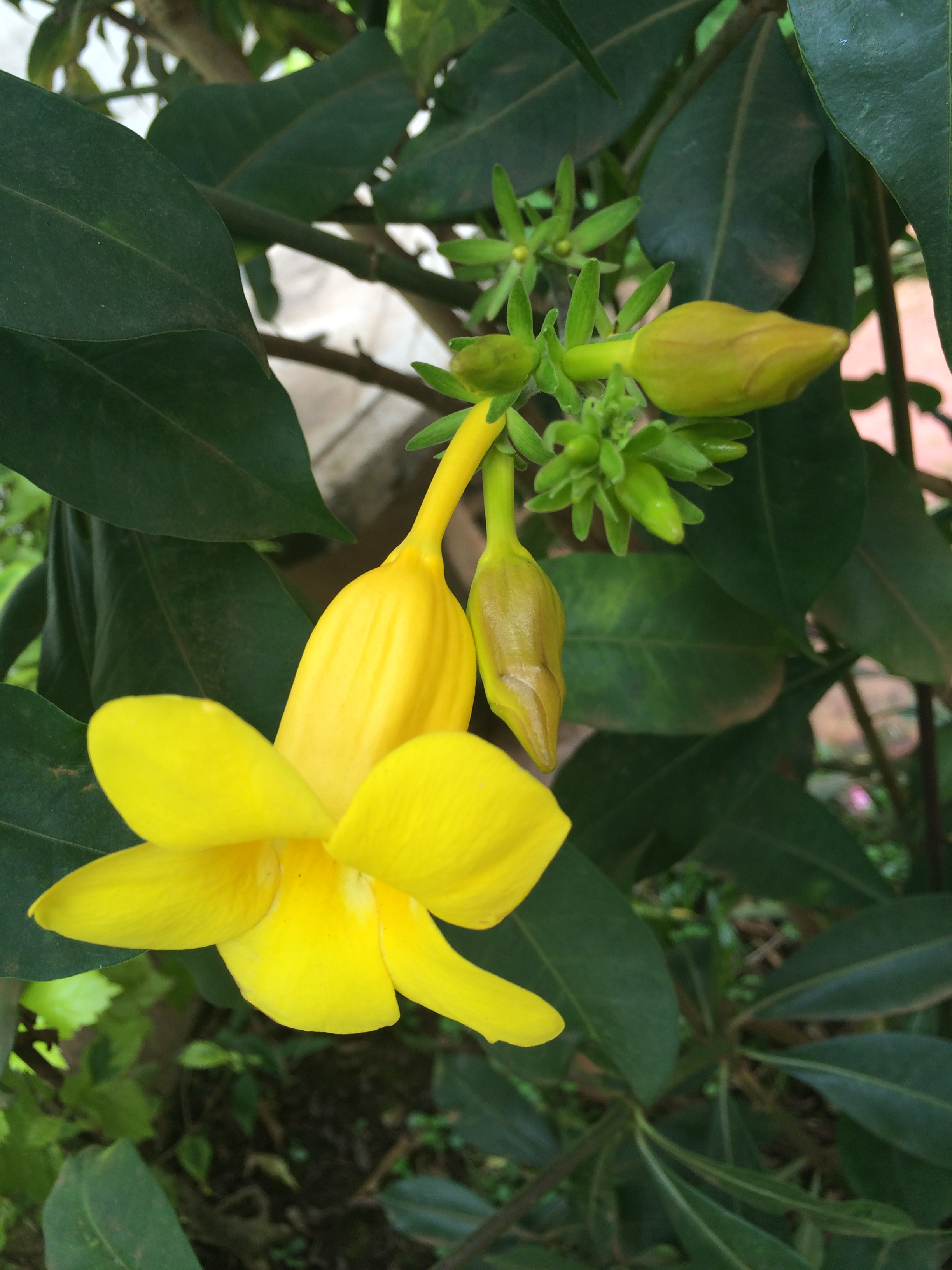 Cette image représente une variante d'Allamanda qu'on retrouve dans la région du Centre à Yaoundé au Cameroun